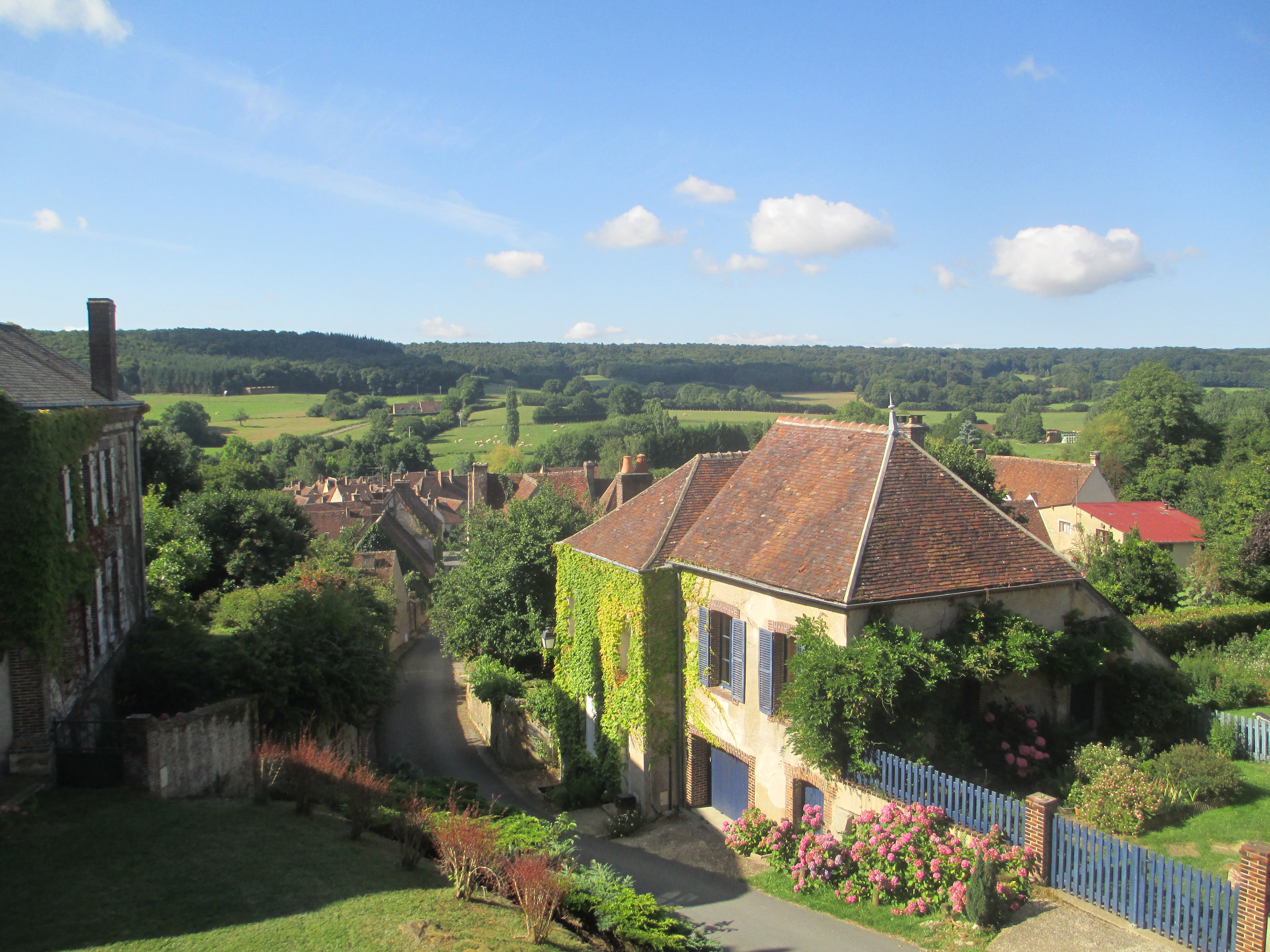 Le village de Moutiers-au-Perche vue depuis l'église Notre-Dame du Mont-Harou.